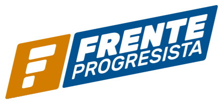 Logo del Frente Progresista Cívico y Social en las elecciones de 2019